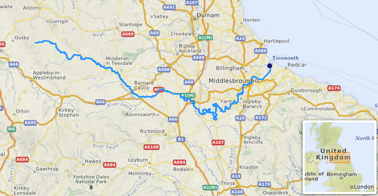 carte réalisée sur umap, [1] This map may be incomplete, and may contain errors. Don't rely solely on it for navigation.